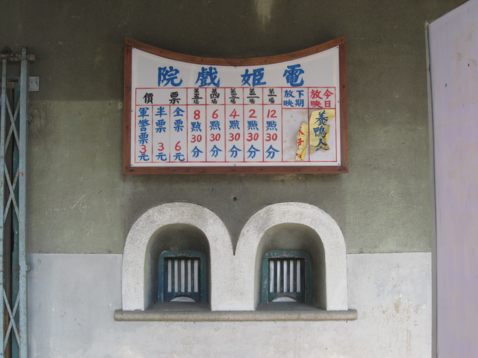 電姬戲院售票口。